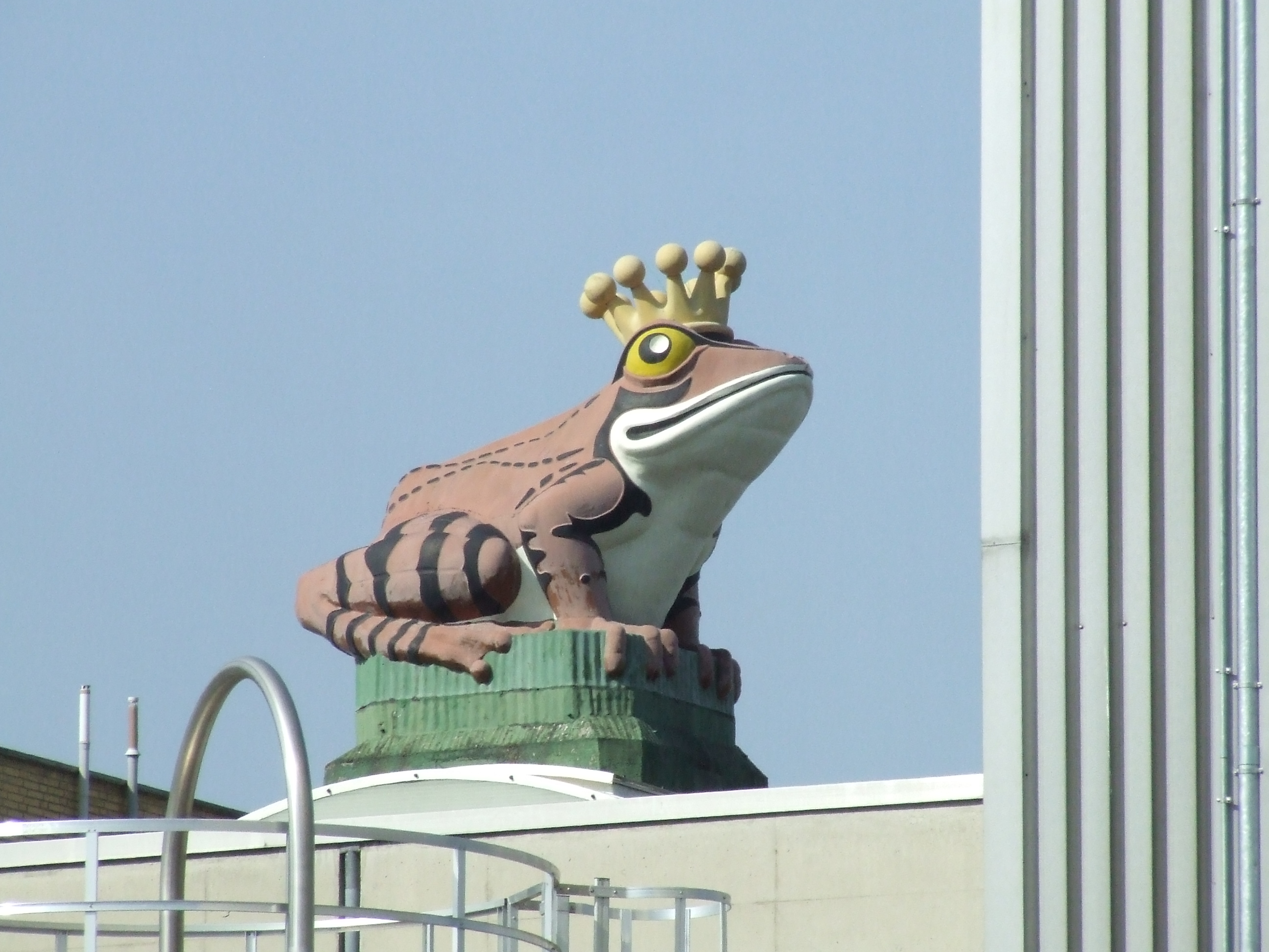 Werner & Mertz in Mainz Erdal-Frosch-Turm